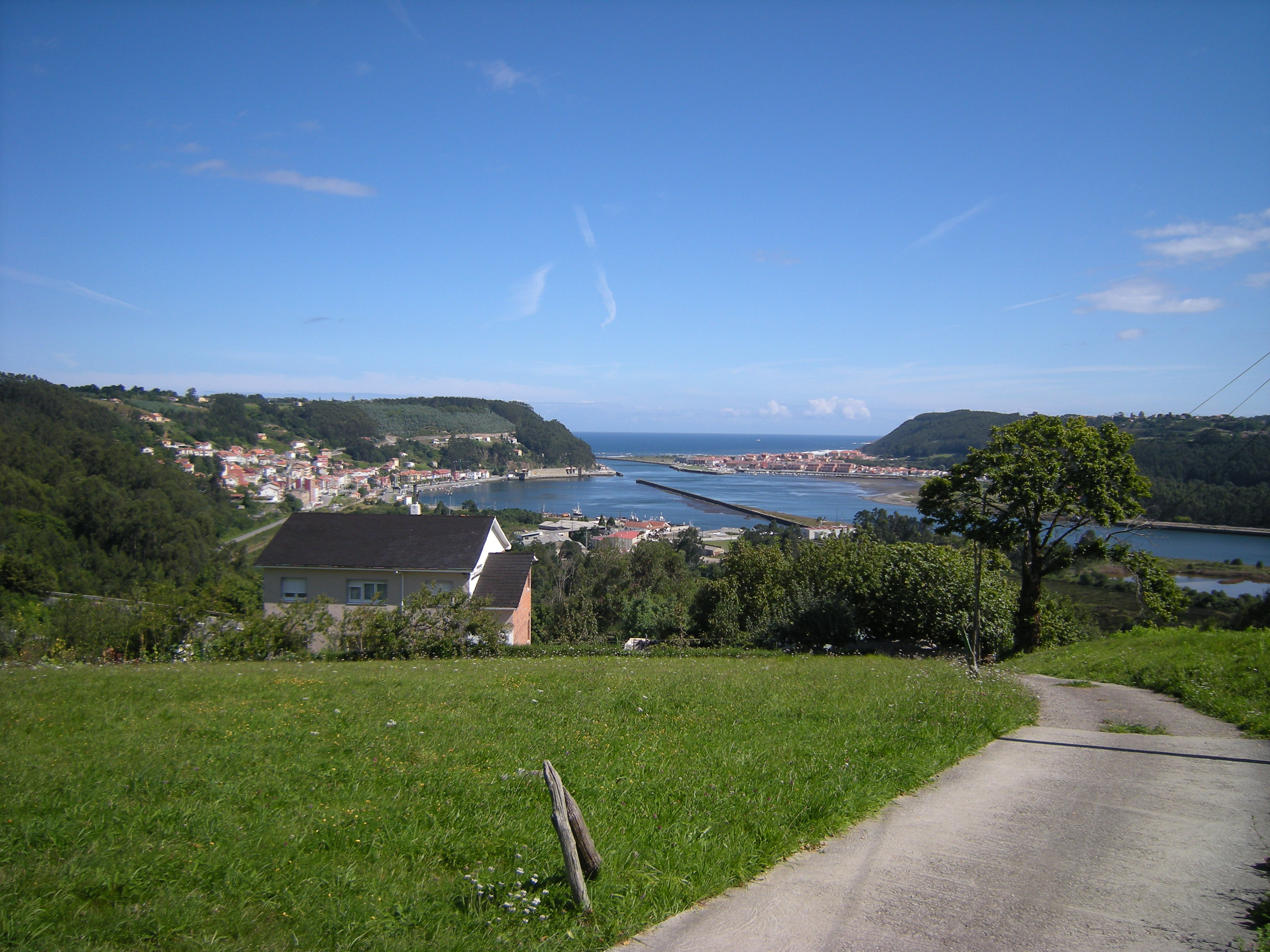 Ría del Nalón con las localidades de San Esteban de Pravia y La Arena.